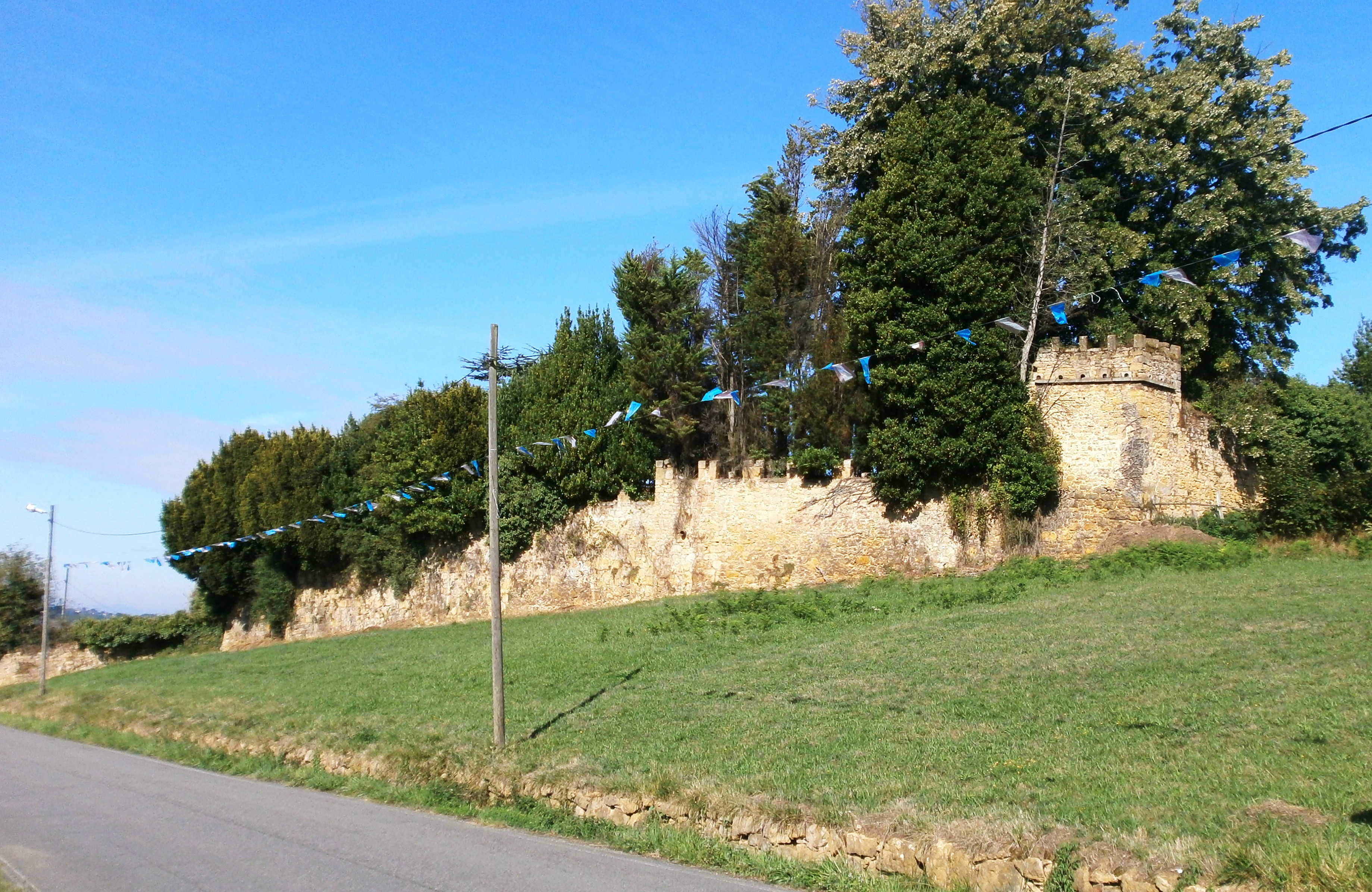 Palacio del Marqués de Canillejas-muralla hacia el sur.